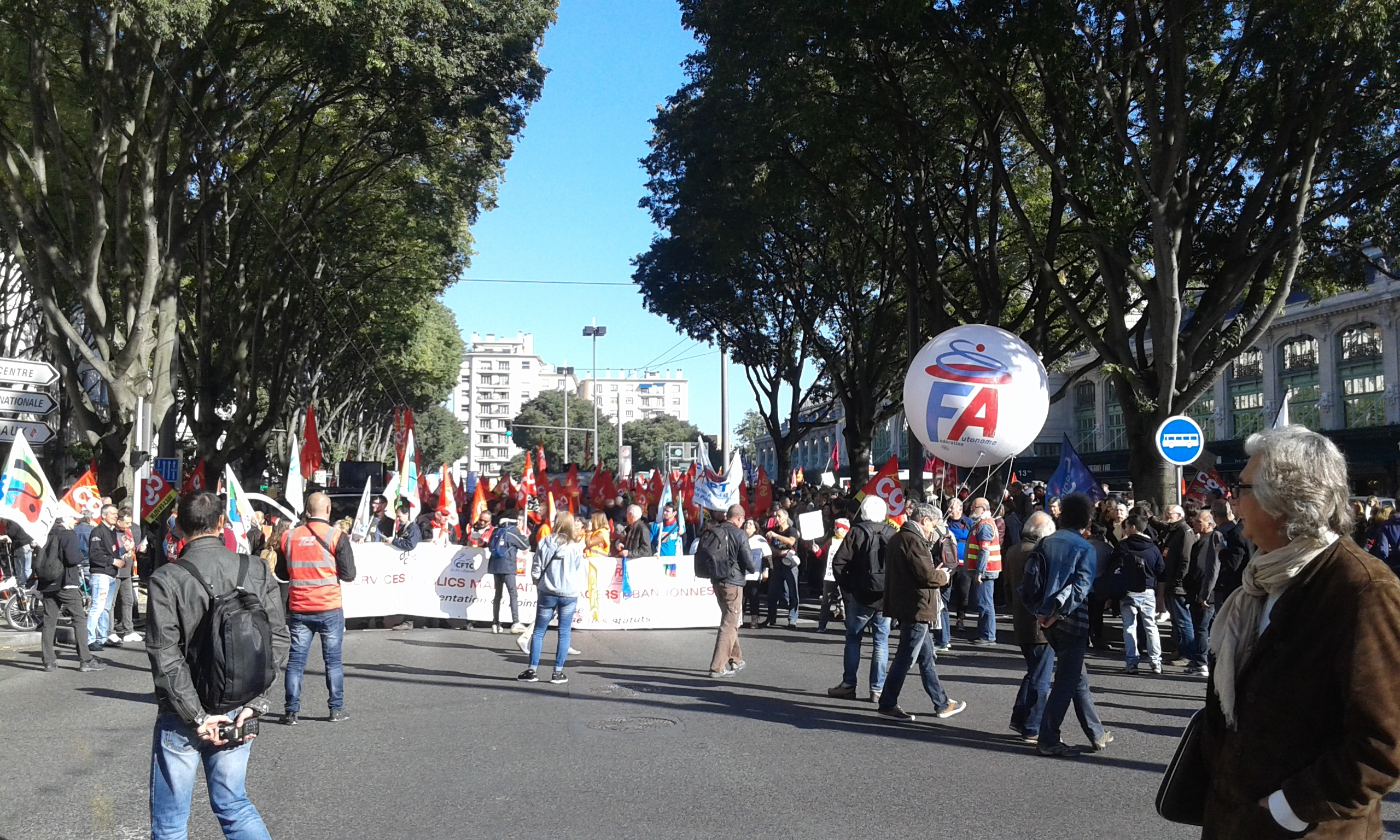 Tête du cortège de la manifestation de fonctionnaires à Lyon du 10 octobre 2017. Il s'agit d'une manifestation contre la réforme du Code du Travail par ordonnances de 2017 et pour l'amélioration des conditions de travail des fonctionnaires. Le secrétaire général du syndicat Force Ouvrière, Jean-Claude Mailly, est présent (homme avec les cheveux blancs au centre de l'image derrière la banderole)